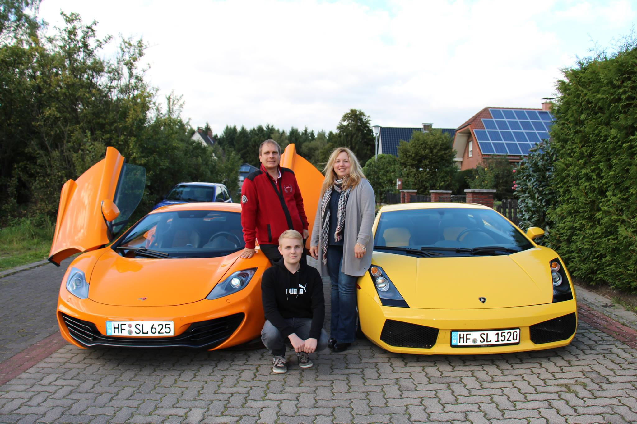 Die Veranstalter der Germanys Supercars Rallye vor einem McLaren MP4-12C und einem Lamborghini Gallardo.